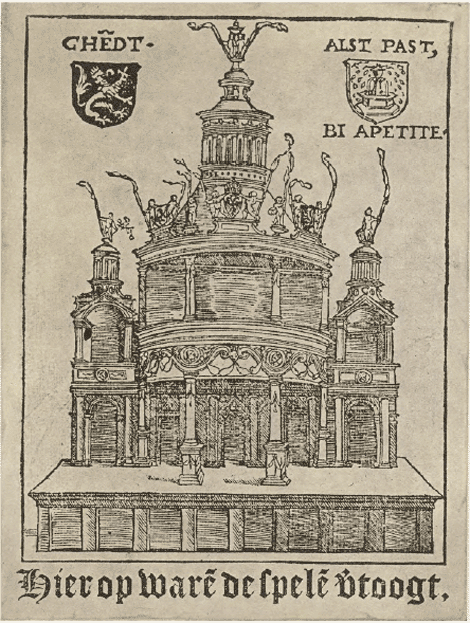 Toneel waarop, voor het landjuweel van Gent in 1539, de spelen werden vertoond. Afbeelding uit de uitgave van de 'Spelen van Sinne', die binnen de stad Gent werden vertoond.